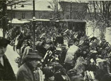 Pobres recogiendo leña en el Wiener Wald y esperando a los tranvías para volver a Viena, invierno de 1919-1920.